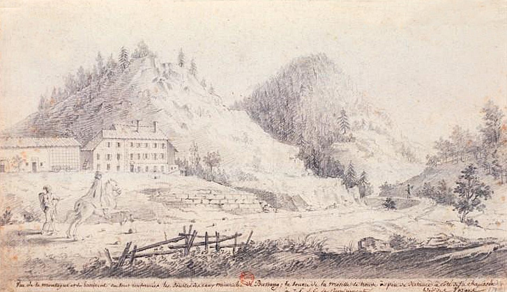 Vue de la montagne et du batiment où sont renfermées les sources des eaux minerales de Bussang (dessin)